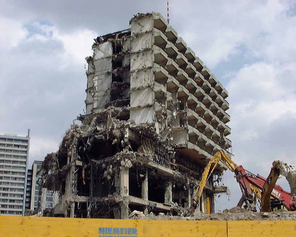 Palasthotel (Berlin-Mitte), 27. Mai 2001: Die letzten Mauern werden eingerissen.